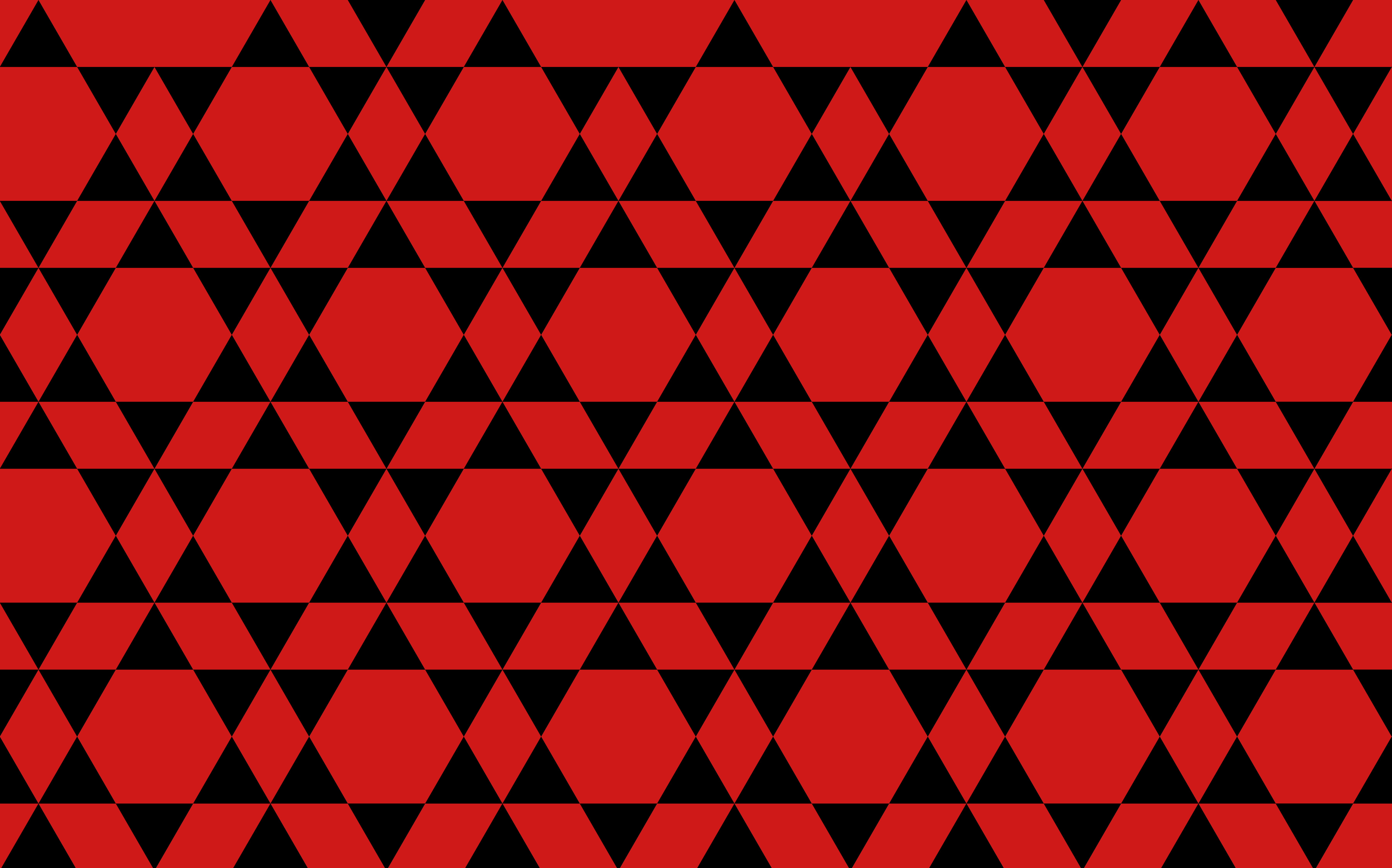 Reproduction du dessin géométrique de la mosaïque retrouvée dans la salle 15 par Marius Vazeilles